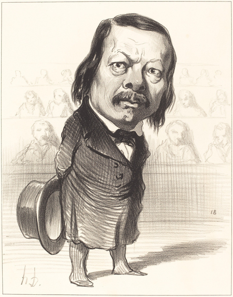 Ferdinand Flocon était un journaliste et un homme politique français, né à Paris le 1er novembre 1800, mort à Lausanne le 15 mai 1866. Caracature par Honoré Daumier.